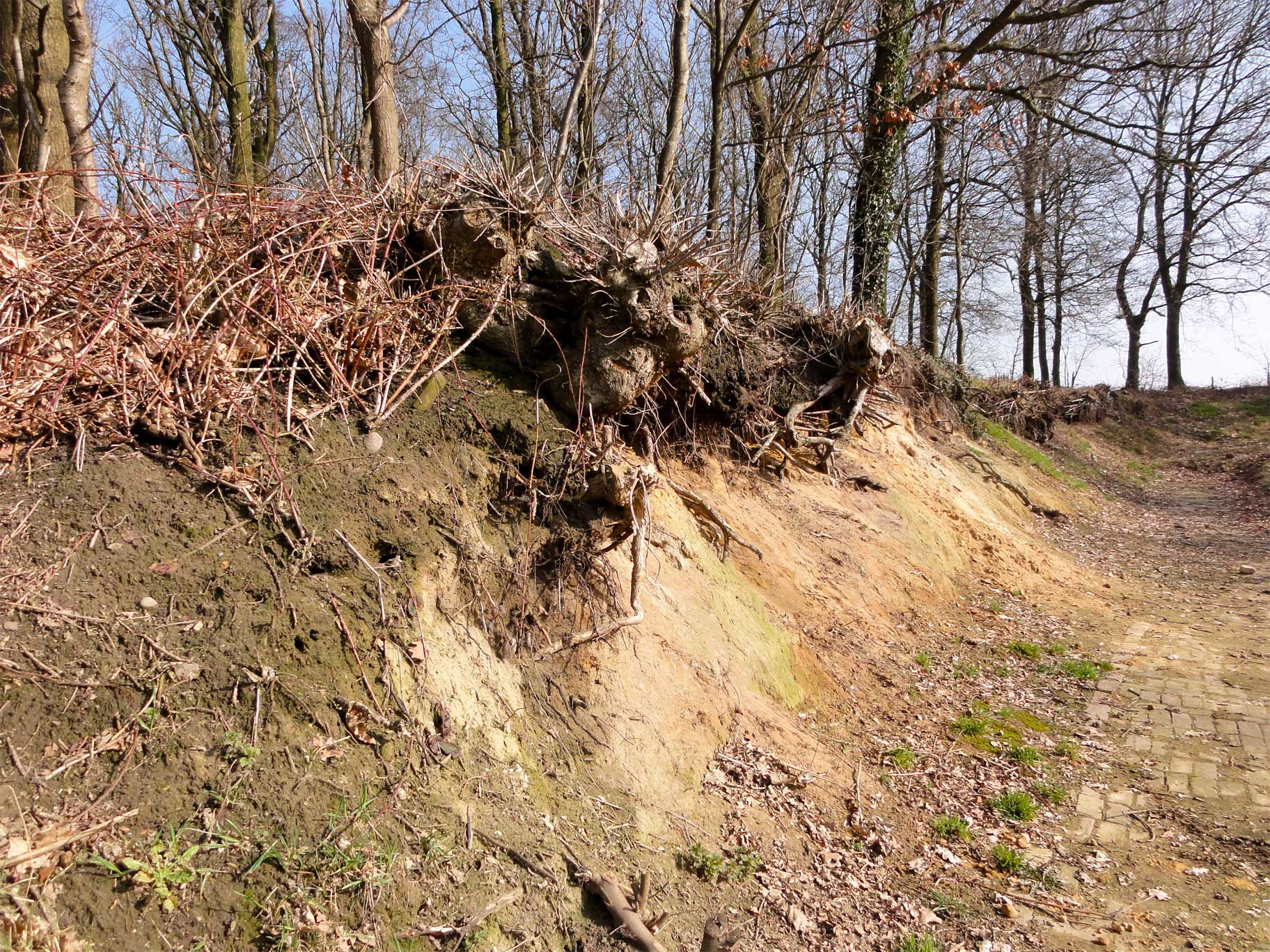 Zandkoele nabij Heetveld, geologisch monument